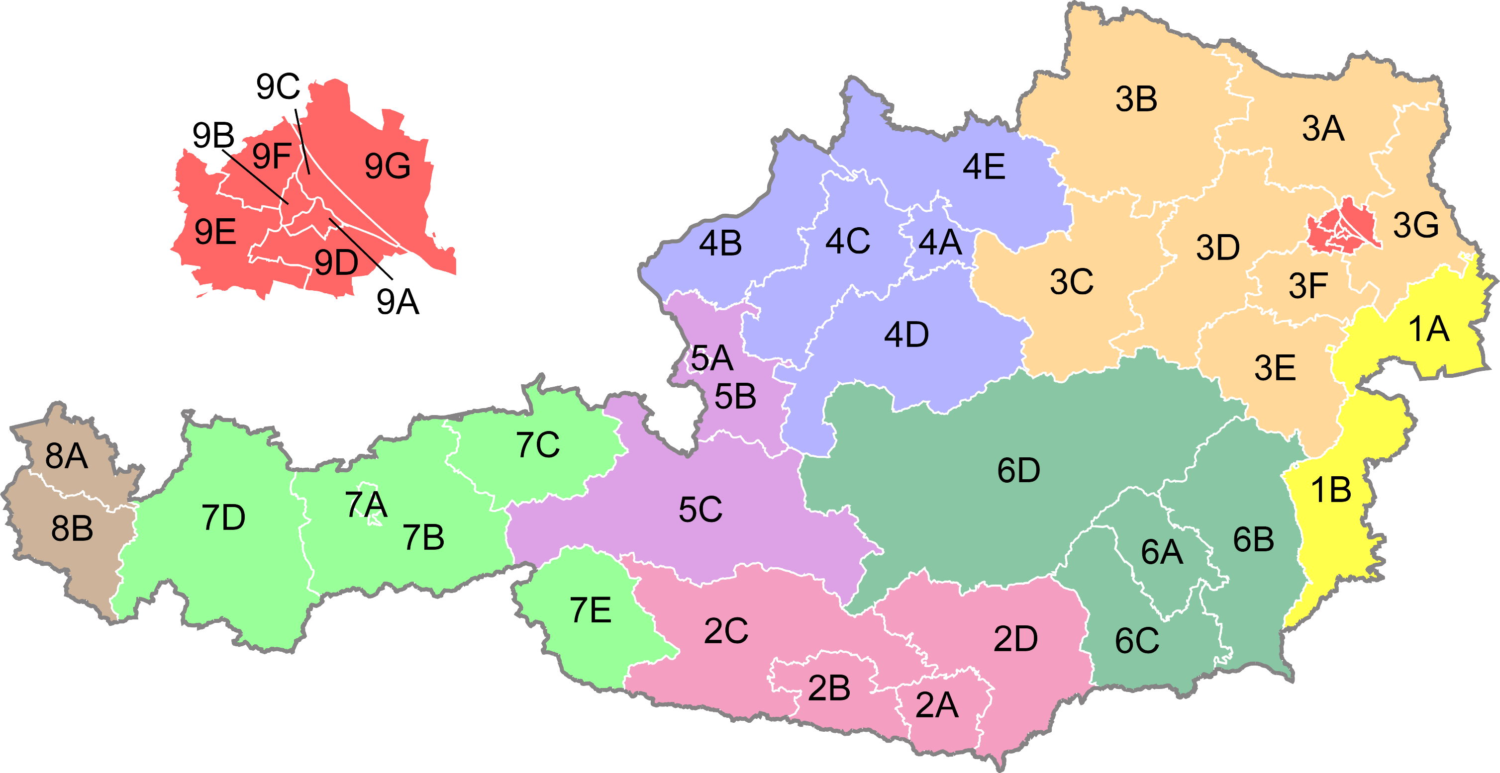 Regionalwahlkreise in Österreich nach der Nationalratsordnung seit 2017